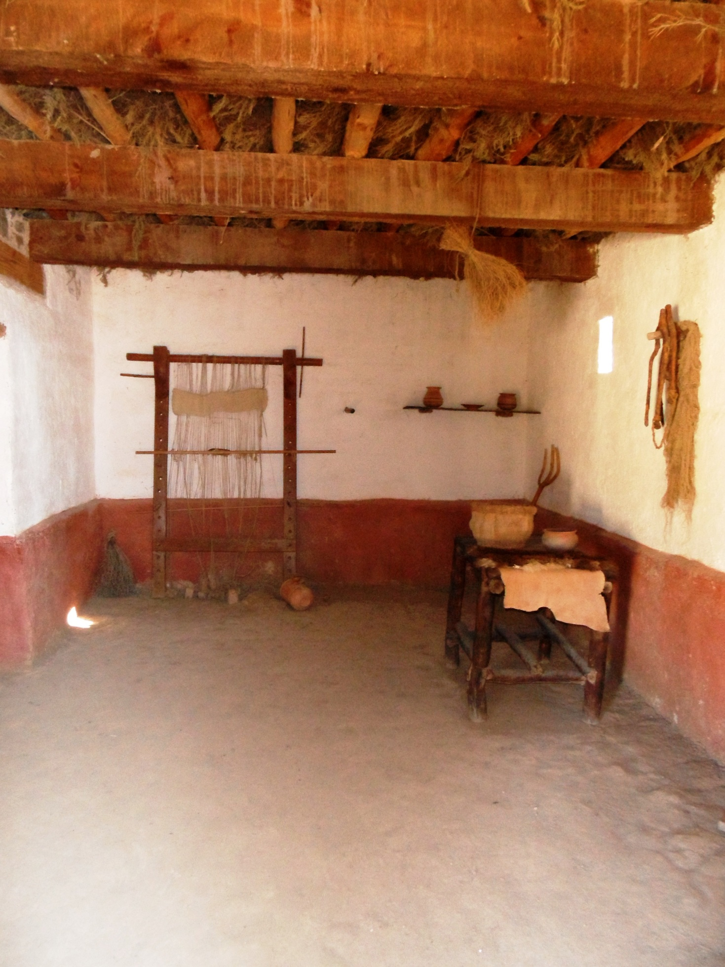 Estància principal de la casa ibèrica; es veu una taula i un teler.